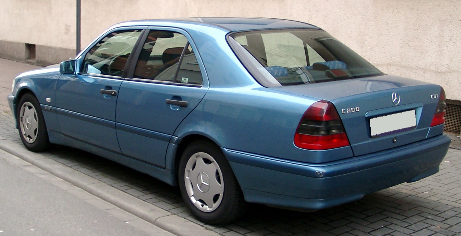 Mercedes-Benz W202